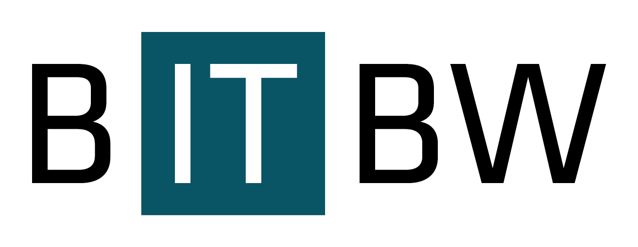 IT Baden-Württemberg (BITBW)